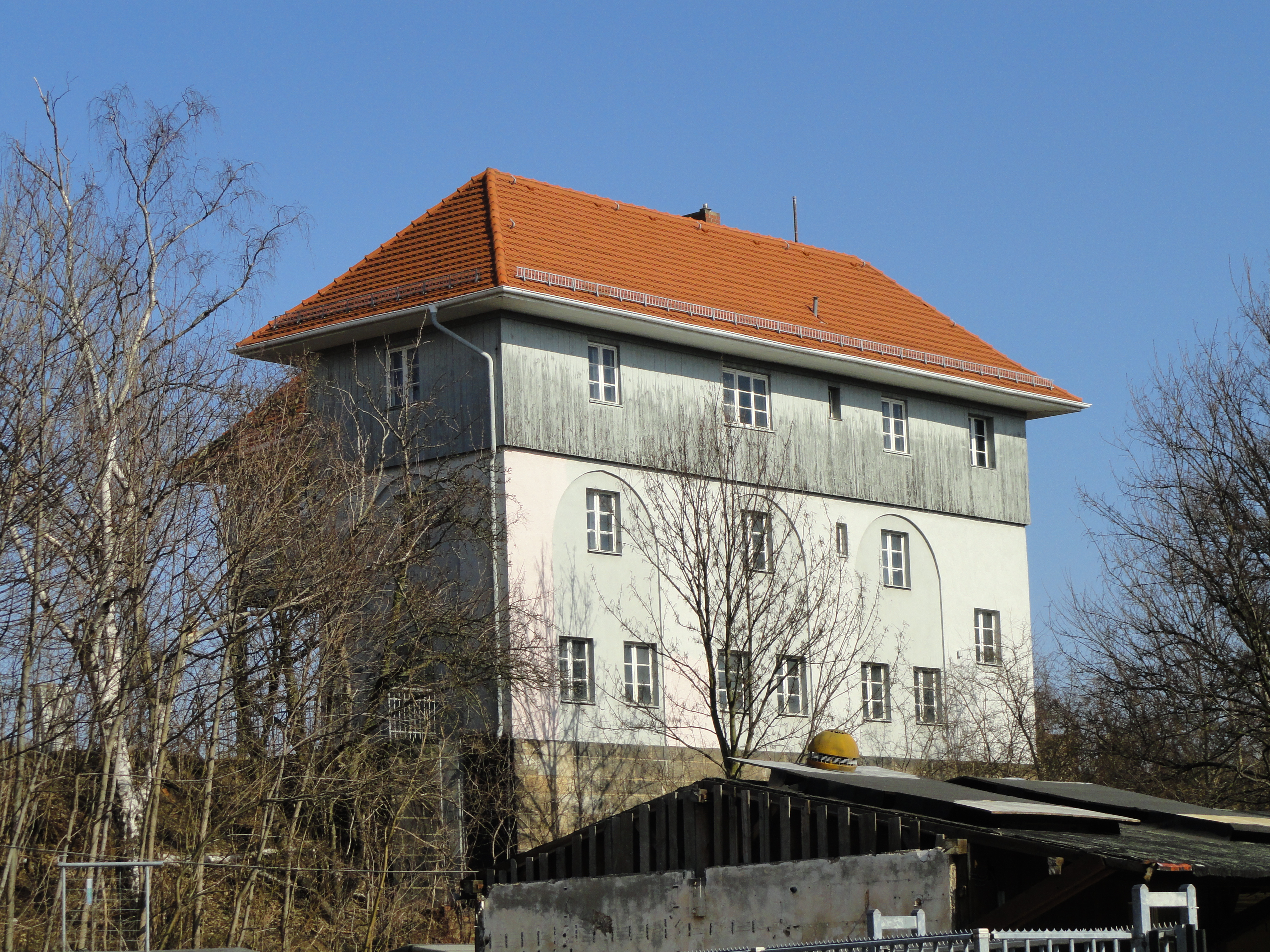 Südseite des Reiterstellwerks B5 im westlichen Gleisvorfeld des Görlitzer Bahnhofs